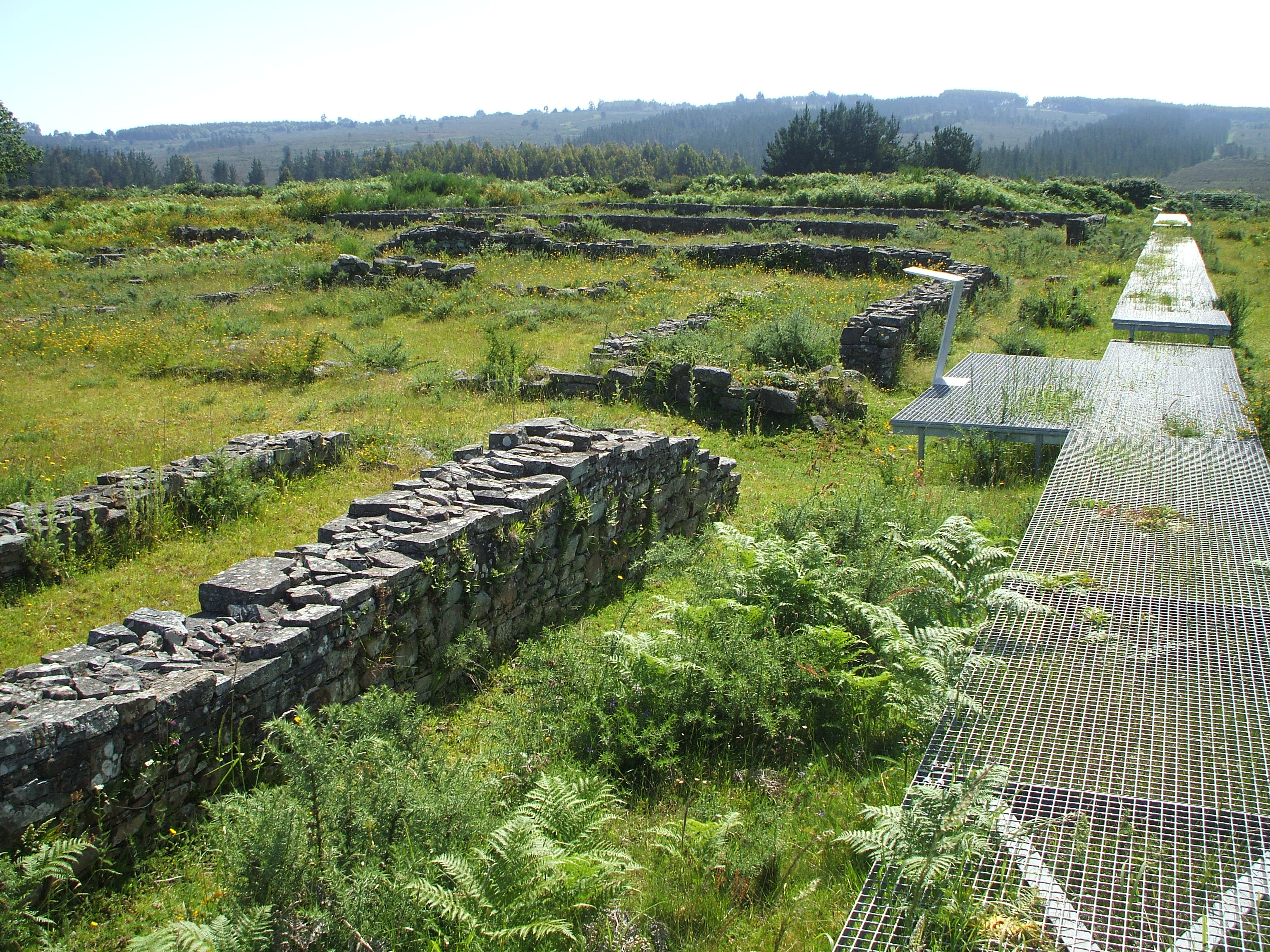 Campamento romano da Ciadella, en Sobrado.